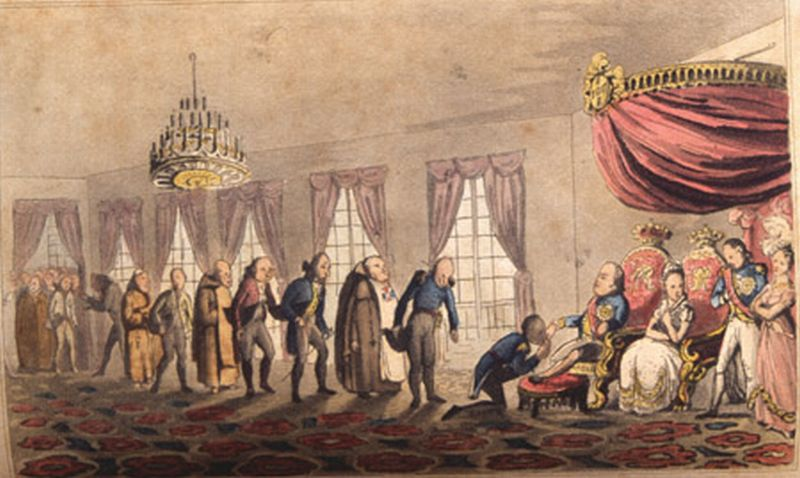 Cerimônia de beija-mão na Corte de D.João VI, Brasil, século XIX